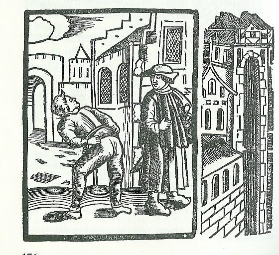 Holzschnitt der Erstausgabe von Botes „Eulenspiegel“